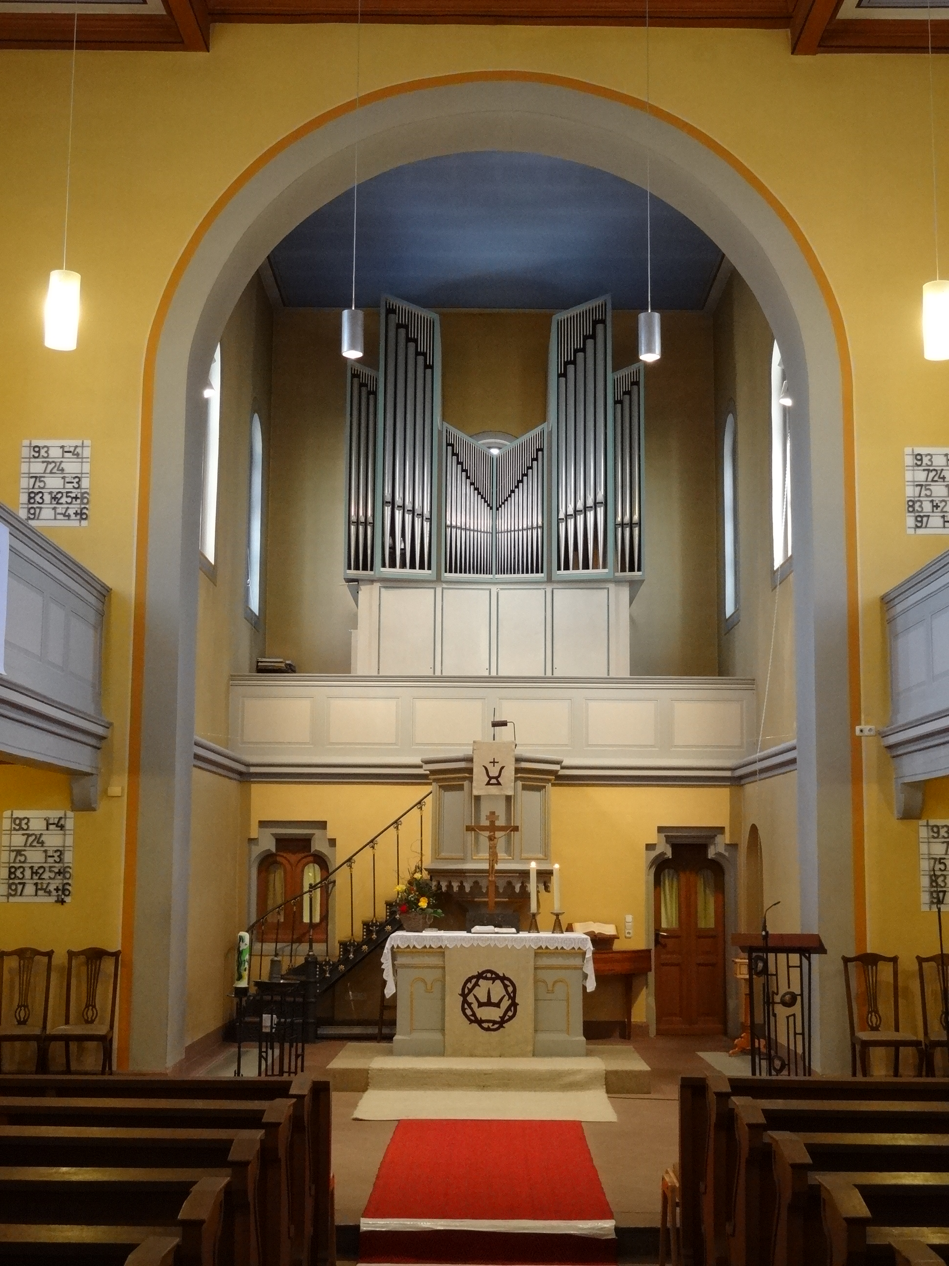 Evangelische Kirche (Kleinlinden)